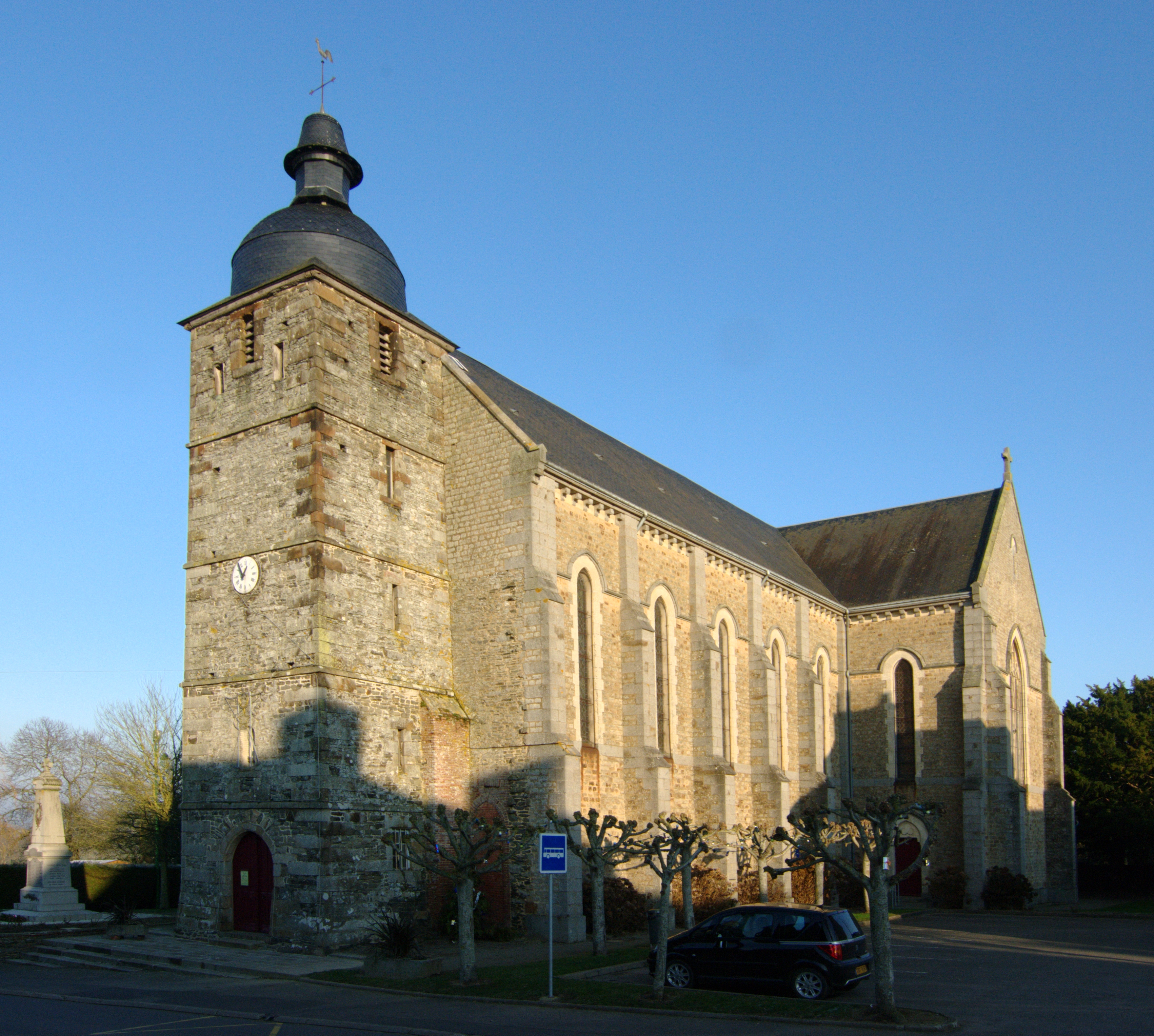 L'église Saint-Eloi à Caligny, Orne.